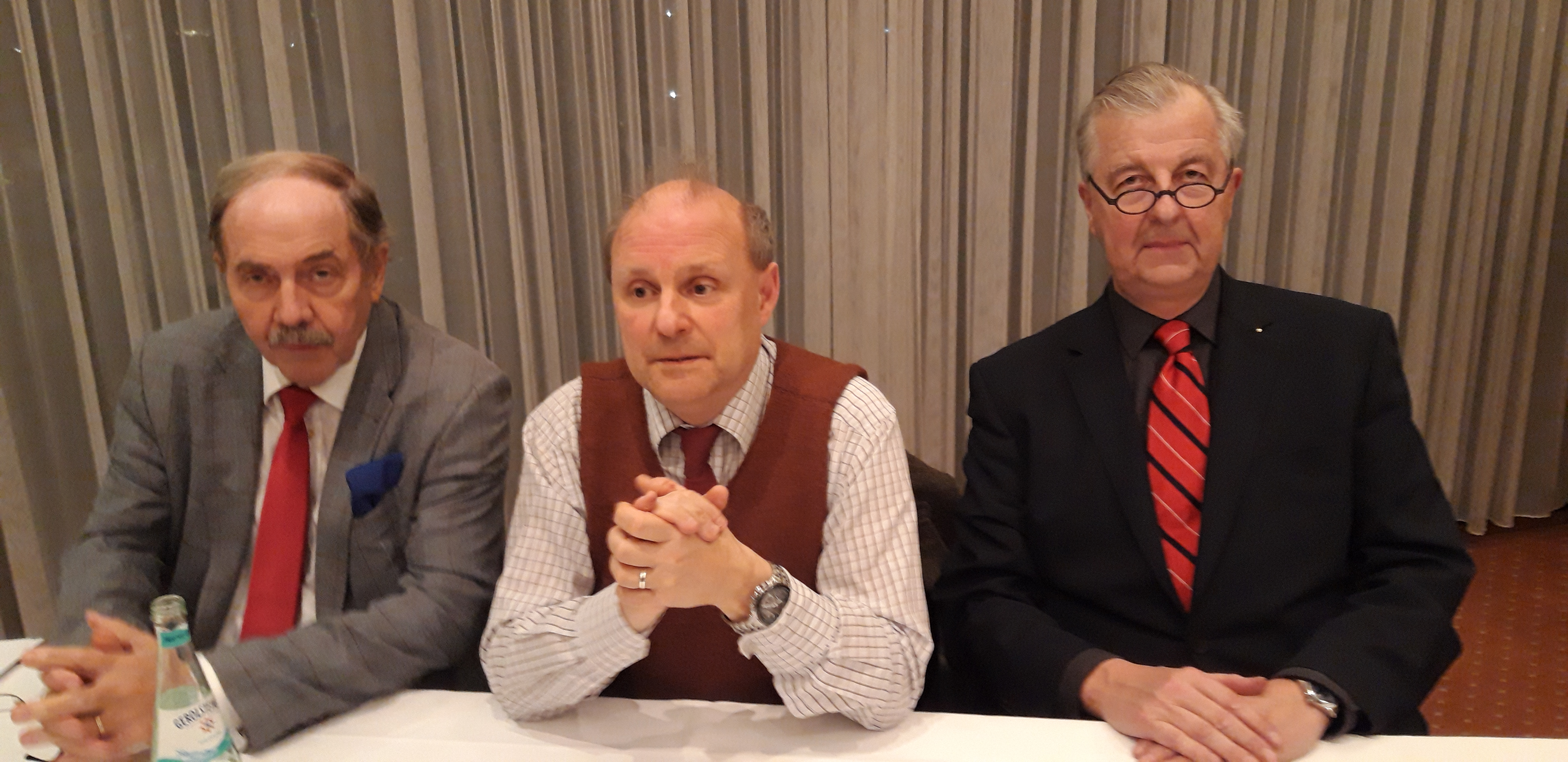 Prof. Dr. Felix Dirsch (Mitte) in einer Diskussionsveranstaltung in Bonn zum Thema "rechtes Christentum" am 6.12.2018